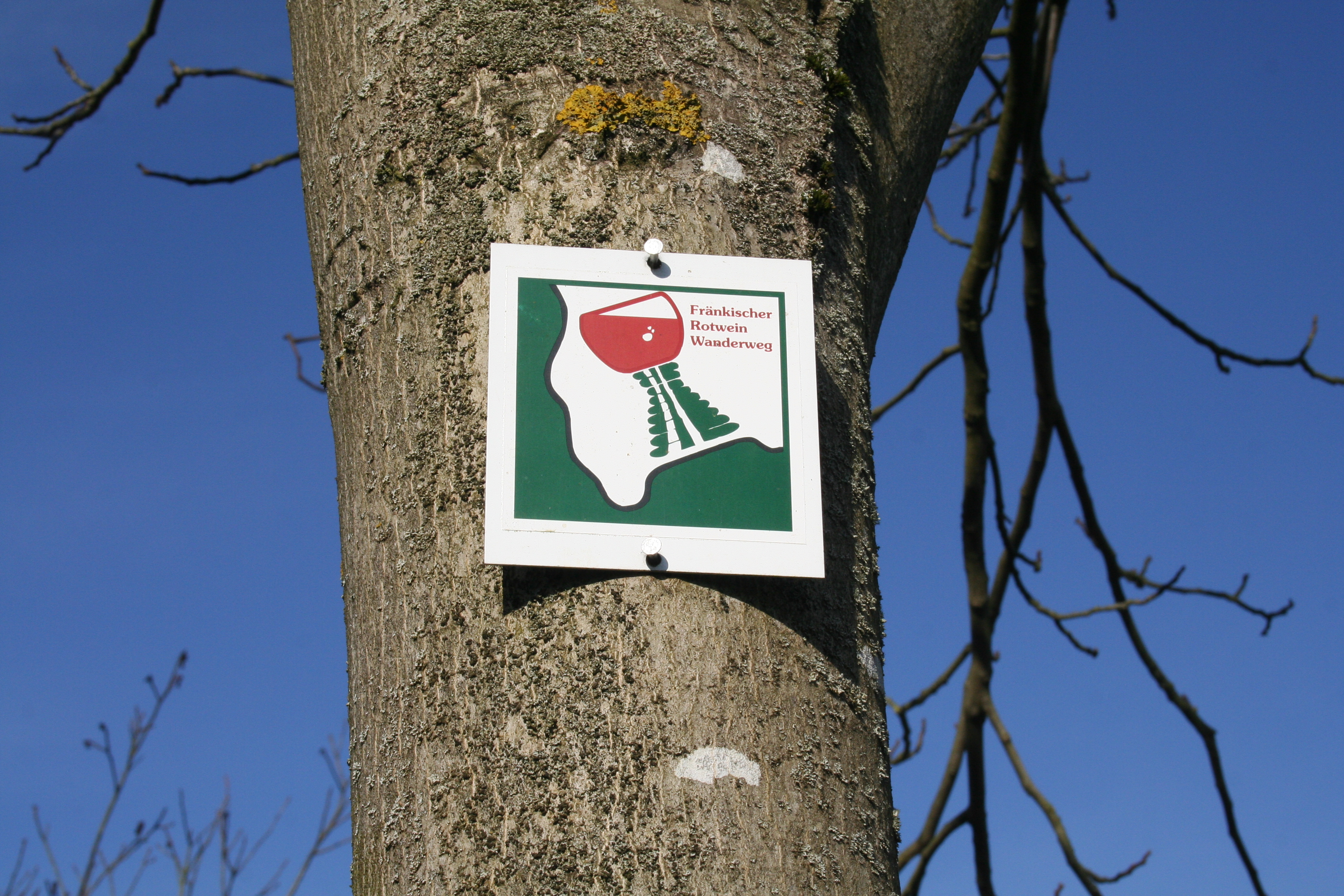 Schild des fränkischen Rotweinwanderweges